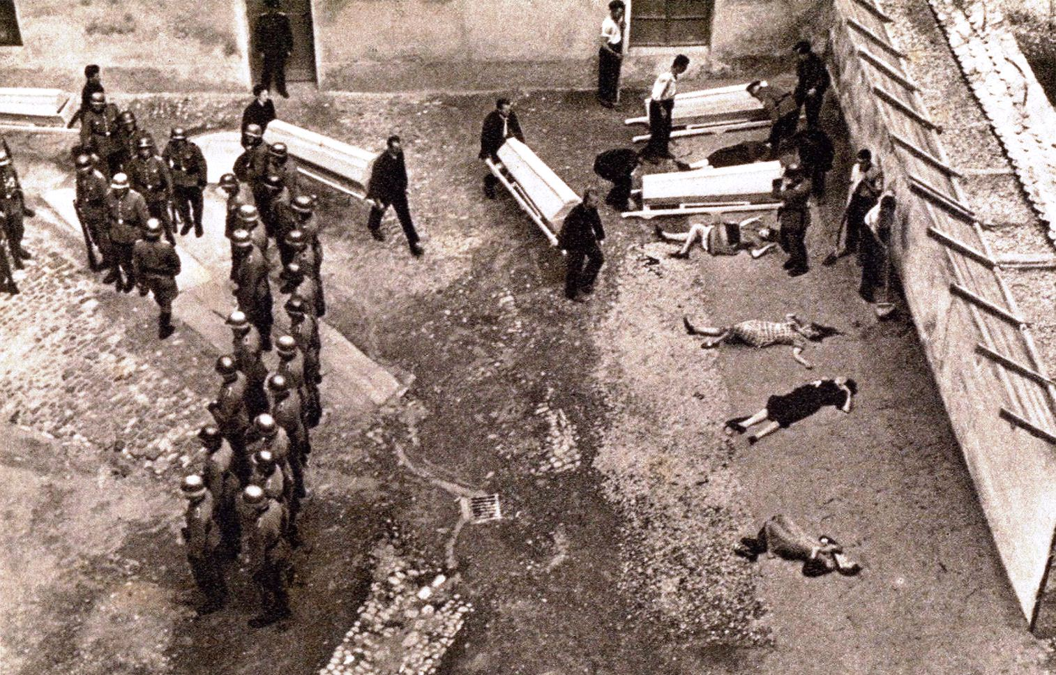 Nalaganje ustreljenih talcev v krste, Stari Pisker, 22. julija 1942.